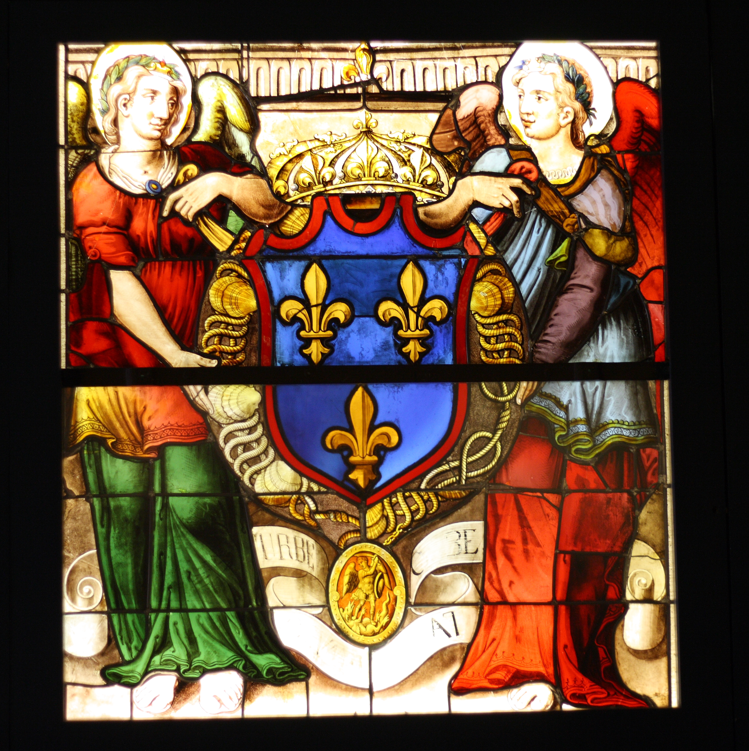 Bleiglasfenster im Musée national de la Renaissance in Écouen